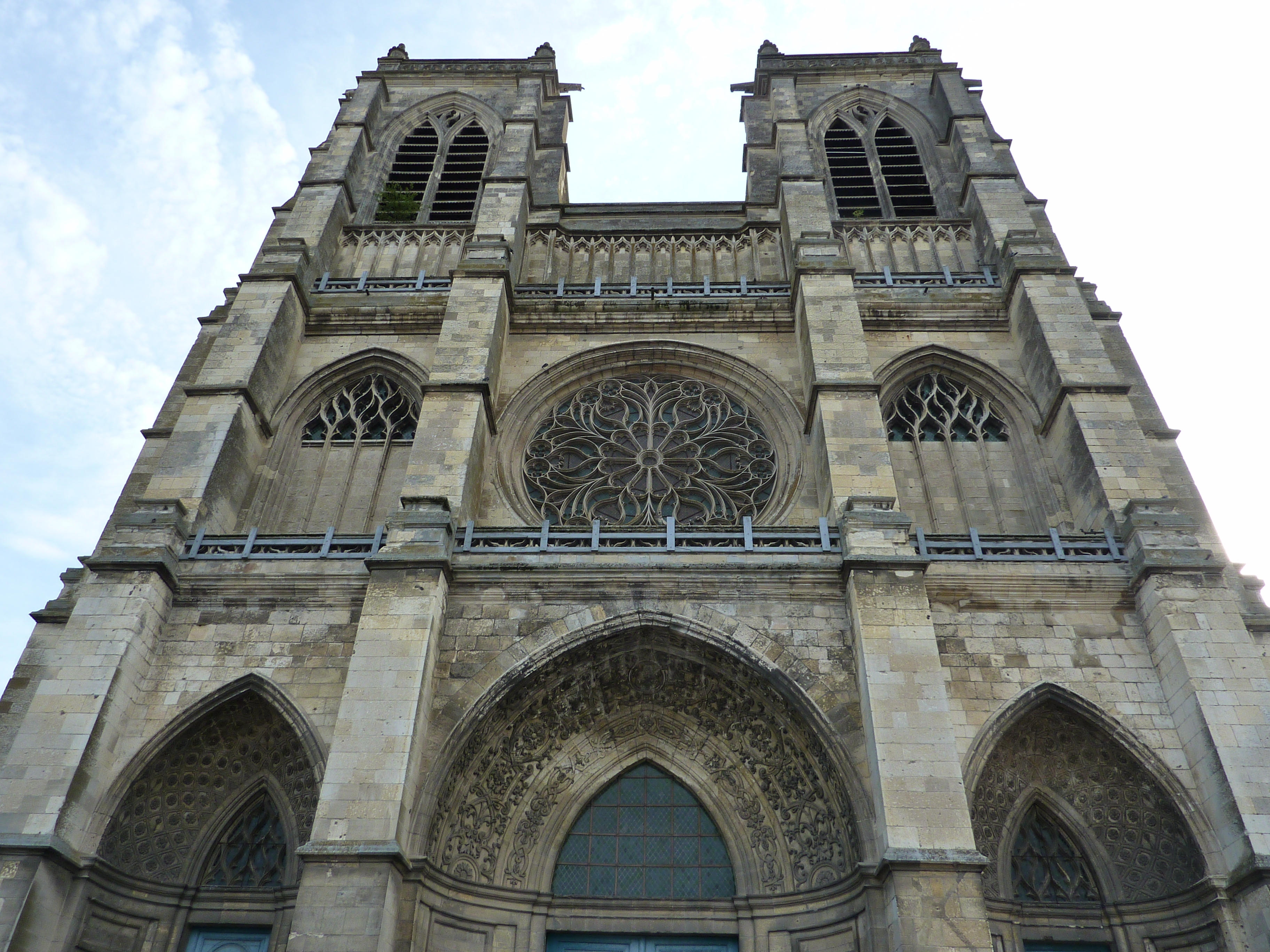 Abbatiale Saint-Pierre de Corbie, SOMME, FRANCE